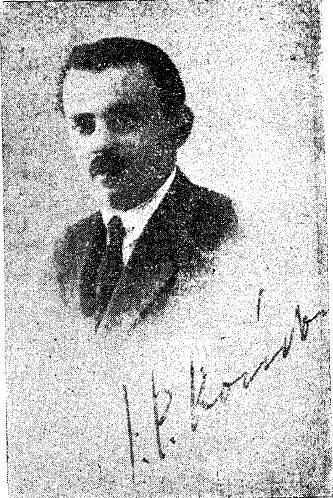 Ιωσήφ Ρ. Κούνδουρος (1885 - 24 Δεκεμβρίου 1942),Έλληνας δικηγόρος και πολιτικός από την Κρήτη.